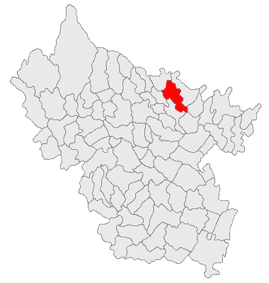 Categorie:Hărţi ale judeţului Buzău